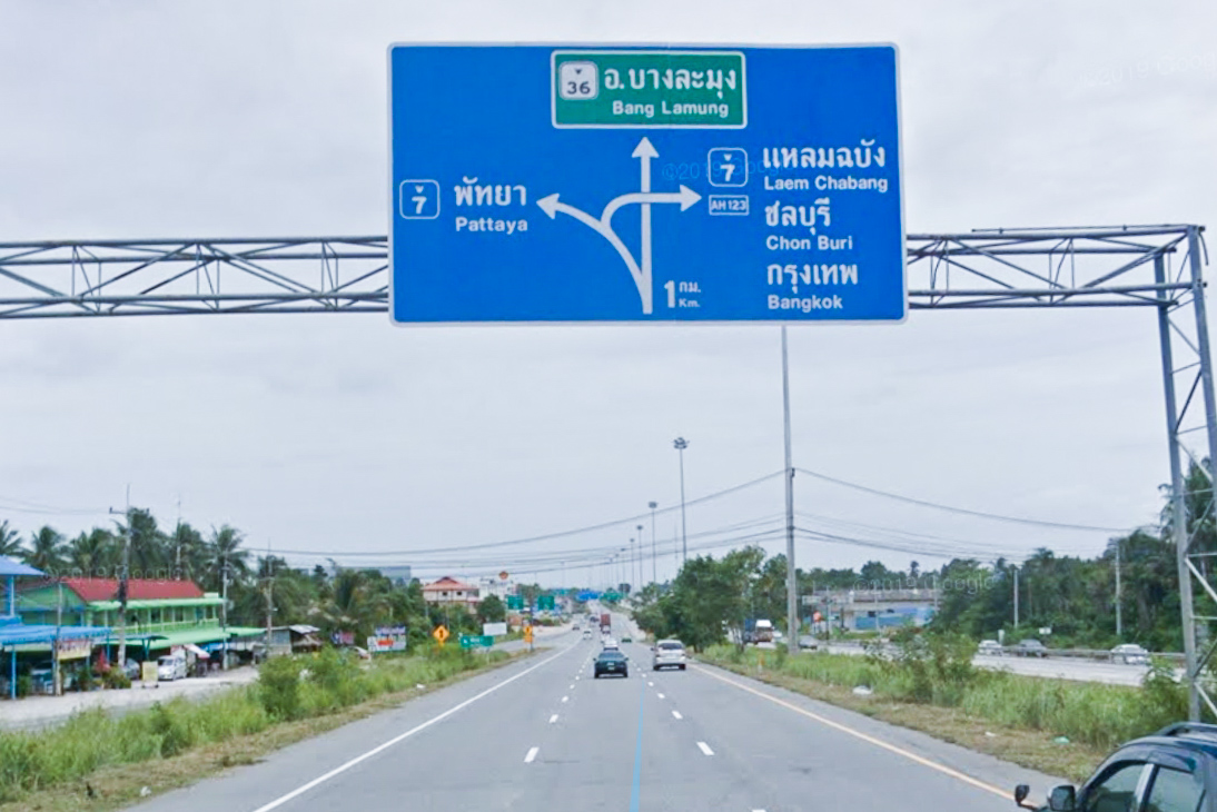 Head to Bang Lamung